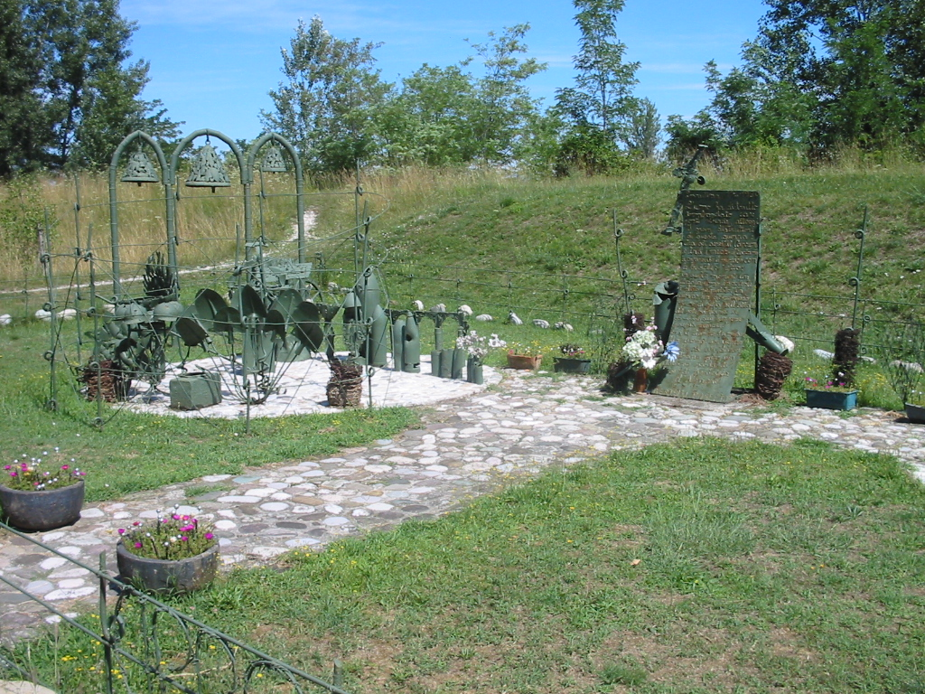 Monumento ai caduti della Grande Guerra, Lovadina, grave del Piave-Realizzato con reperti originali ritrovati nella zona